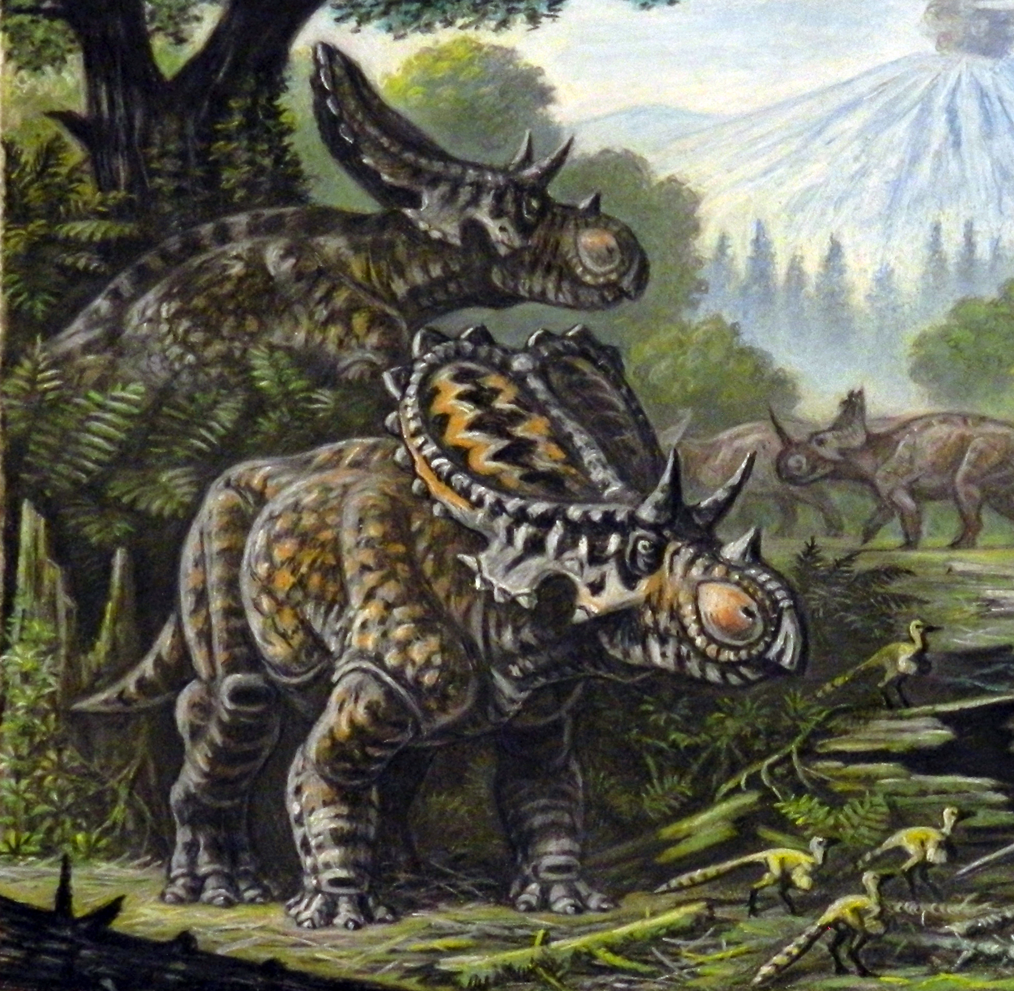 Mercuriceratops.